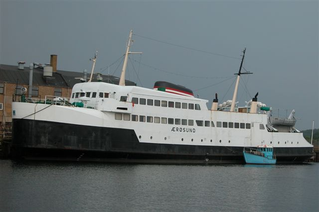 M/F Ærøsund. Ærøskøbing - Svendborg 1959 - 1999